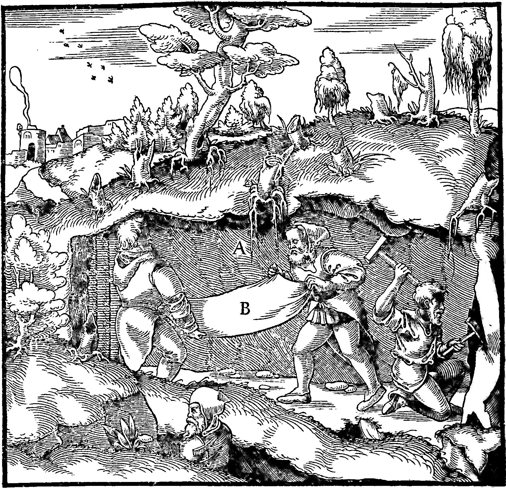 Incisione da De re metallica di Georg Agricola, Basilea, 1556